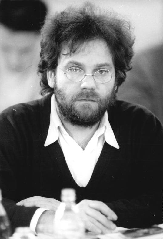 ADN-ZB-Mittelstädt-19.1.1990-Berlin: Carlo Jordan, Sprecher der Grünen Partei der DDR.